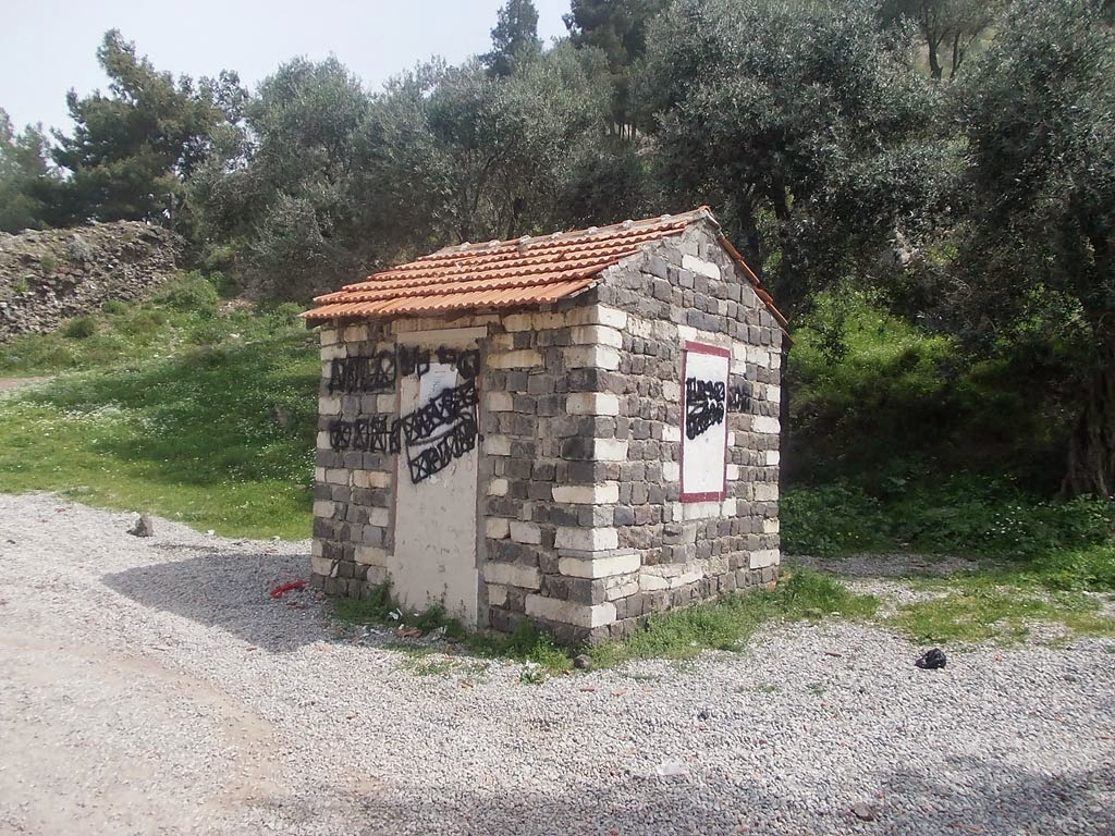 Tarzan Topkale - Nisan 2014